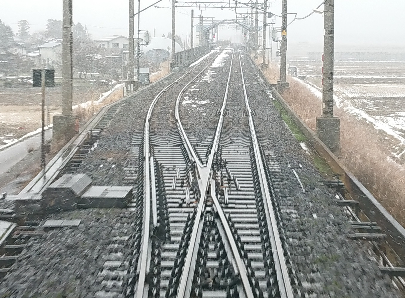 北越急行ほくほく線くびき駅のノーズ可動クロッシング。